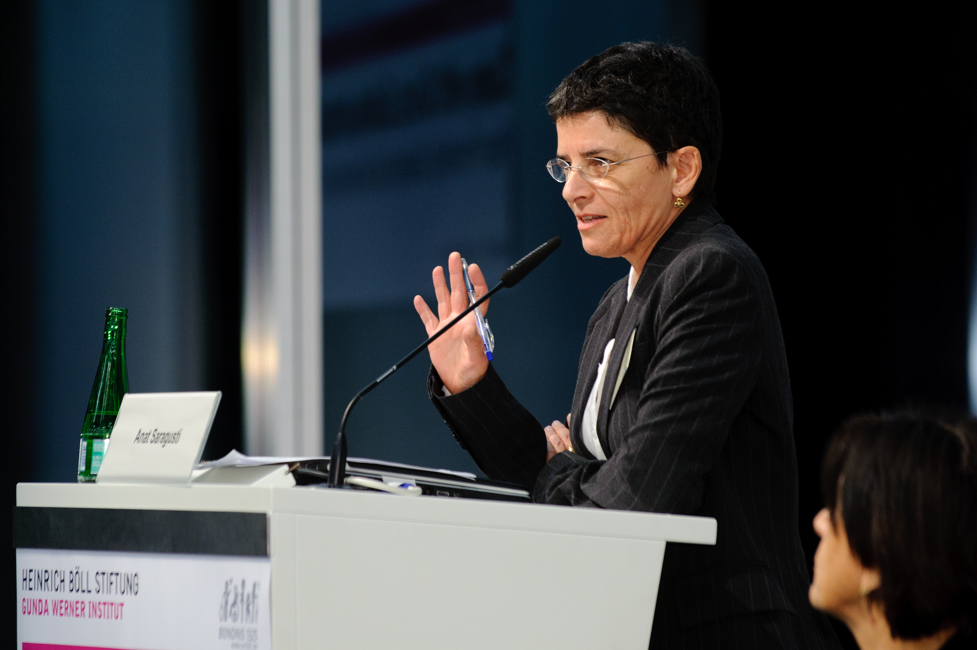 Anat Saragusti (Journalist, Israel)